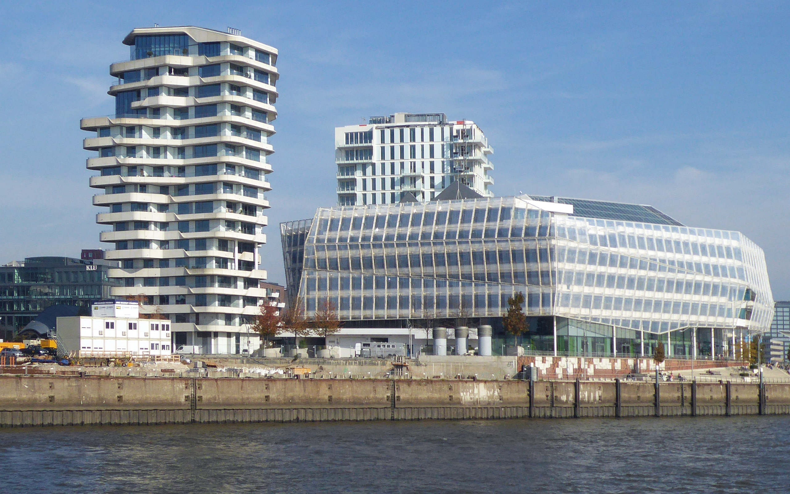 Marco-Polo-Center und Unilever Haus am Strandhafen der Norderelbe in Hamburg Foto Wolfgang Pehlemann P1270870